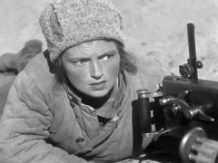 Фрагмент кадра фильма "Чапаев" (1934)